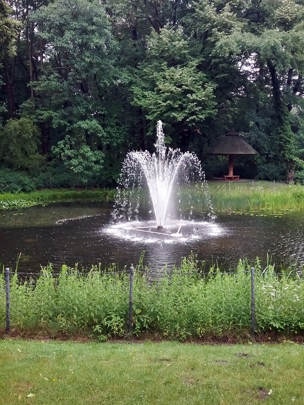 Fontäne Schlosspark Biesdorf